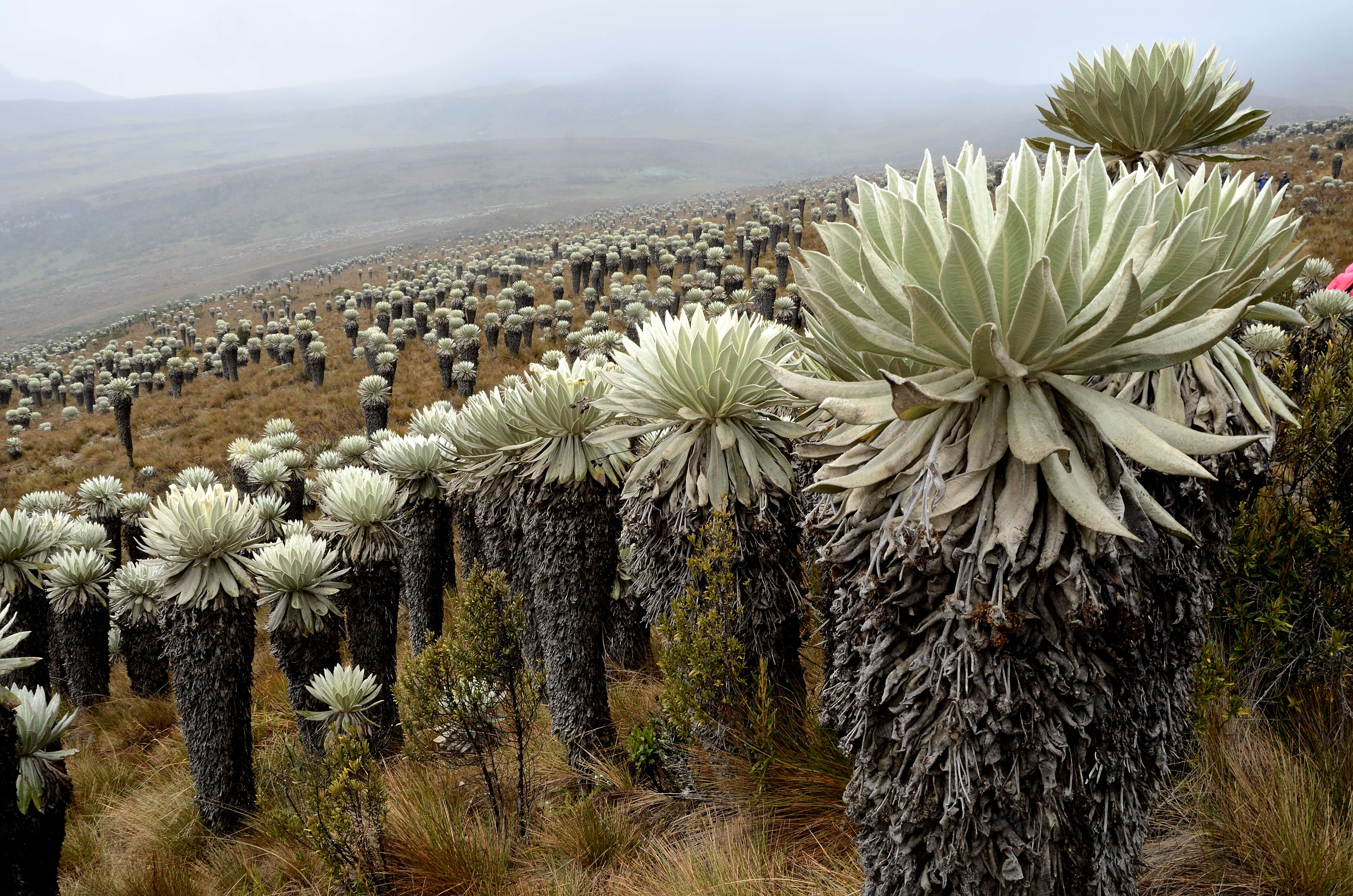 Paramo de Ocetá - Colombia 2012